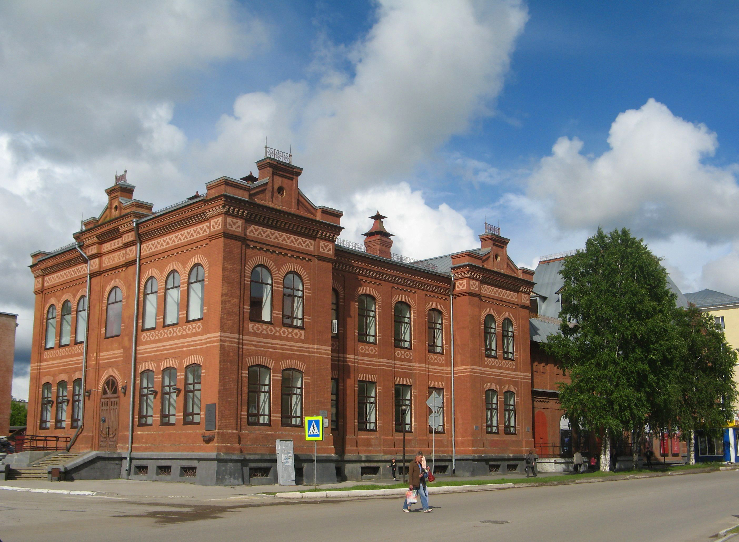 Ремесленное училище: улица Мира, 31, Лысьва, Пермский край